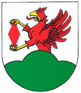 Das Wappen wurde am 10. Juli 1992 durch das Innenministerium genehmigt und unter der Nr. 60 der Wappenrolle von Mecklenburg-Vorpommern registriert.